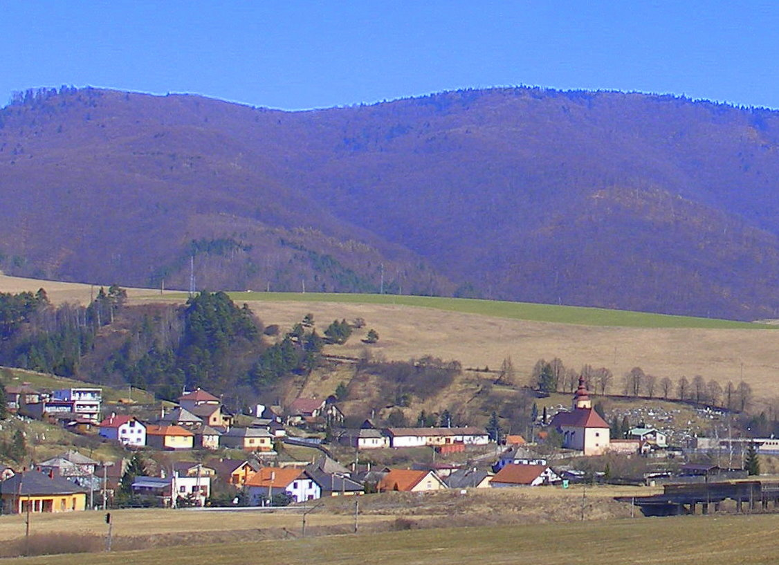 Obec Kluknava okres Gelnica, región Spiš.